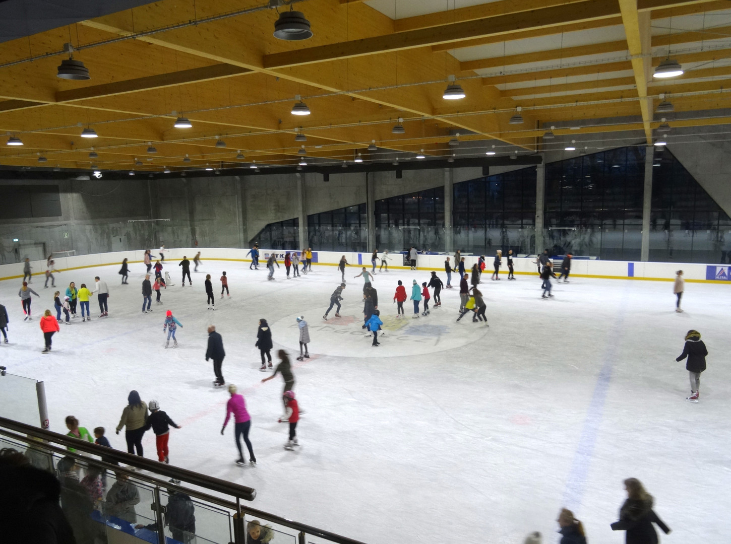 Sztuczne lodowisko "Torbyd" w Bydgoszczy, ul. Toruńska 59